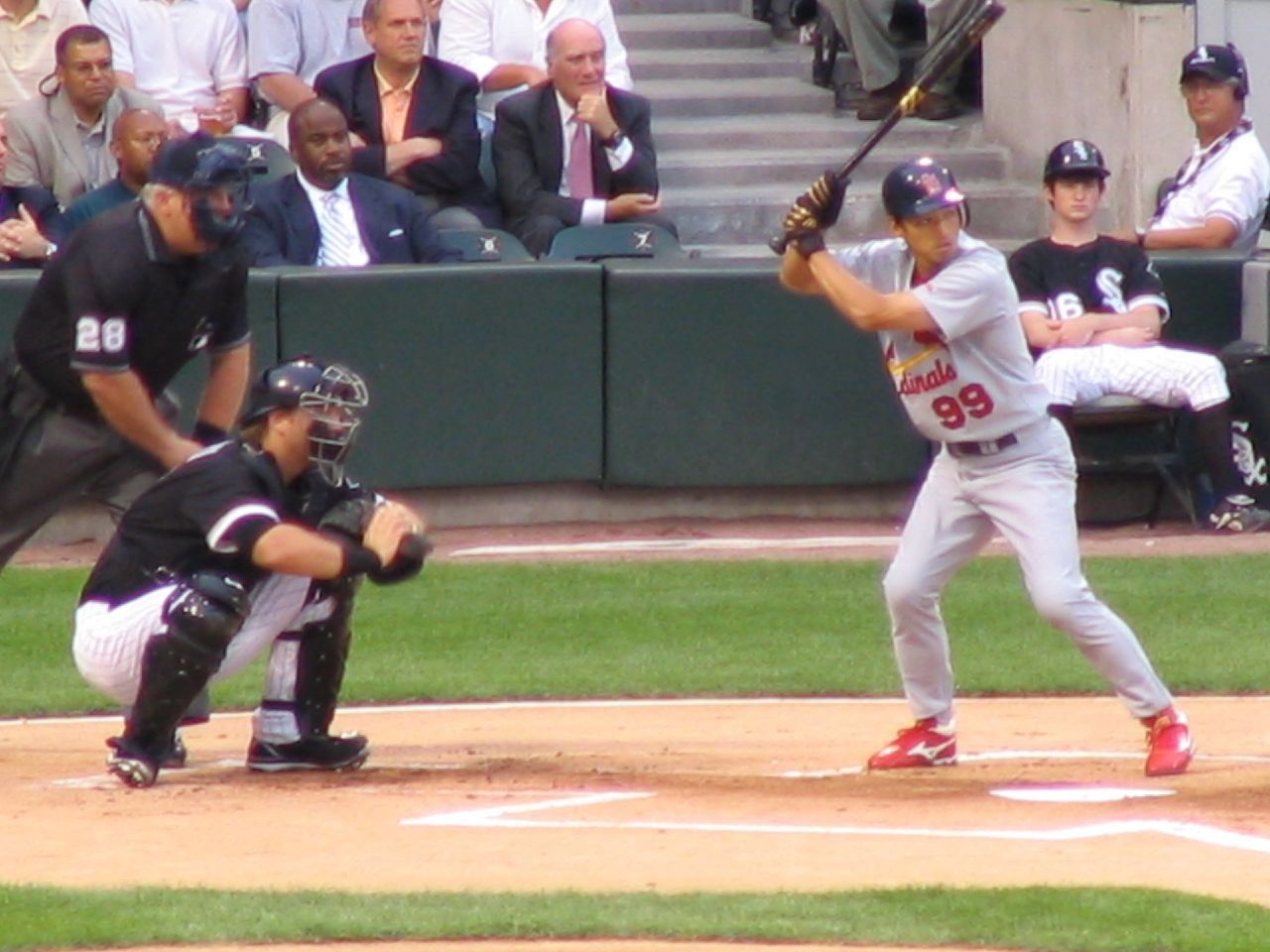 So Taguchi